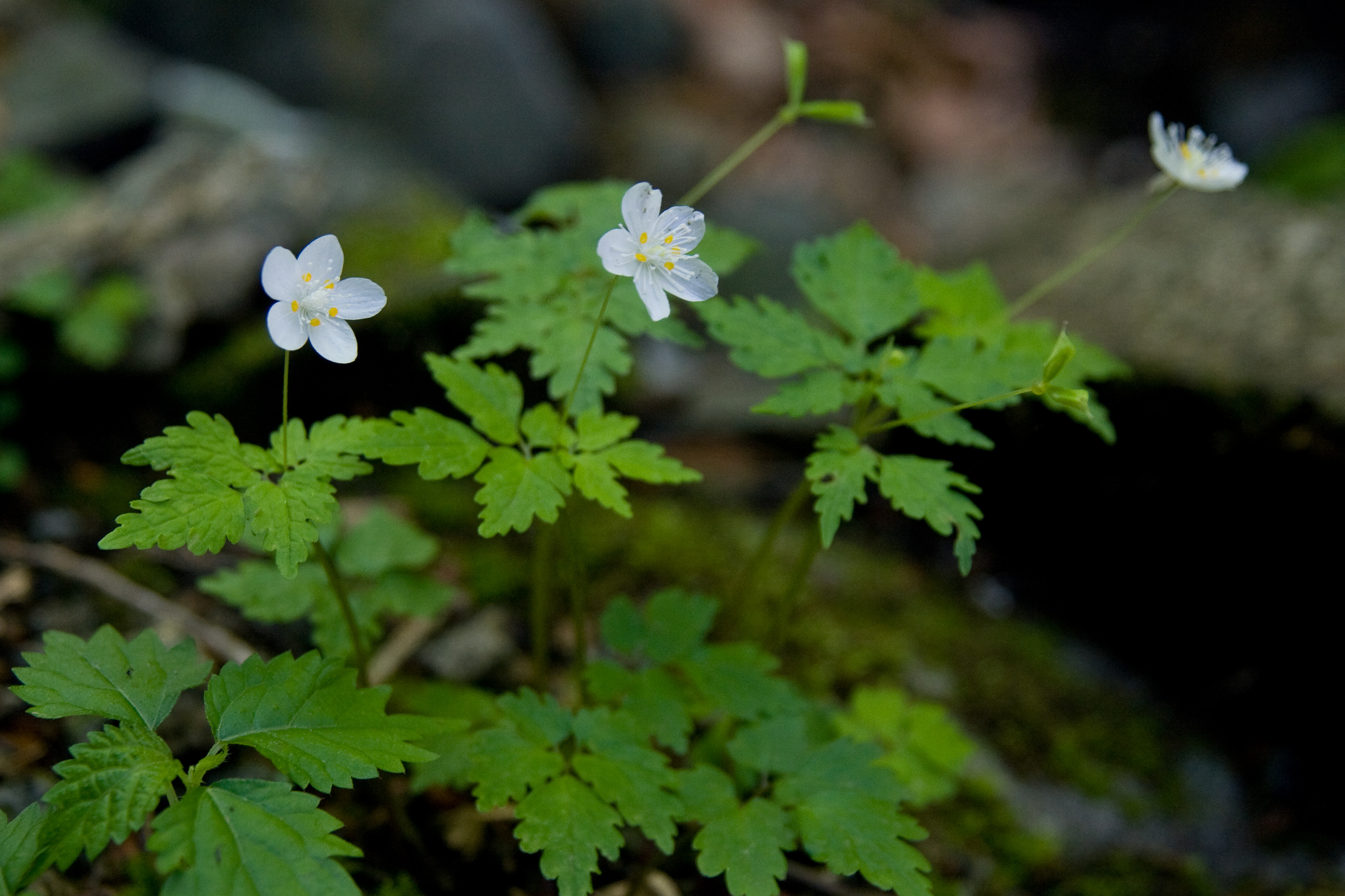 ツルシロカネソウ (学名:Dichocarpum stoloniferum)